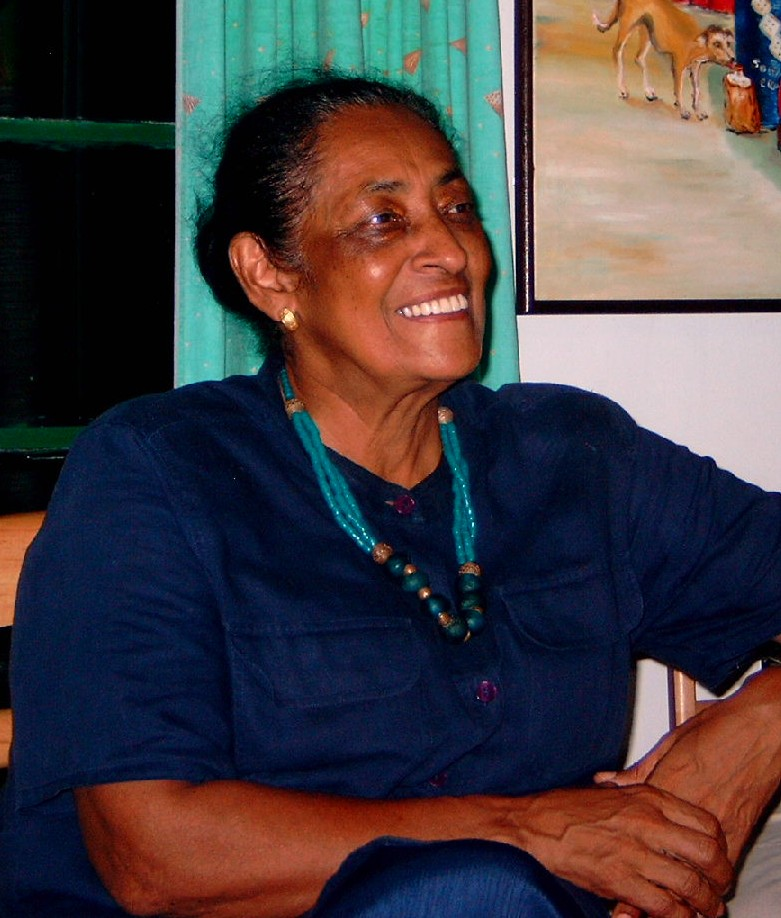 De Surinaamse dichter Trudi Guda, 30 oktober 2005. Eigen foto, beschikbaar gesteld voor publiek domein.